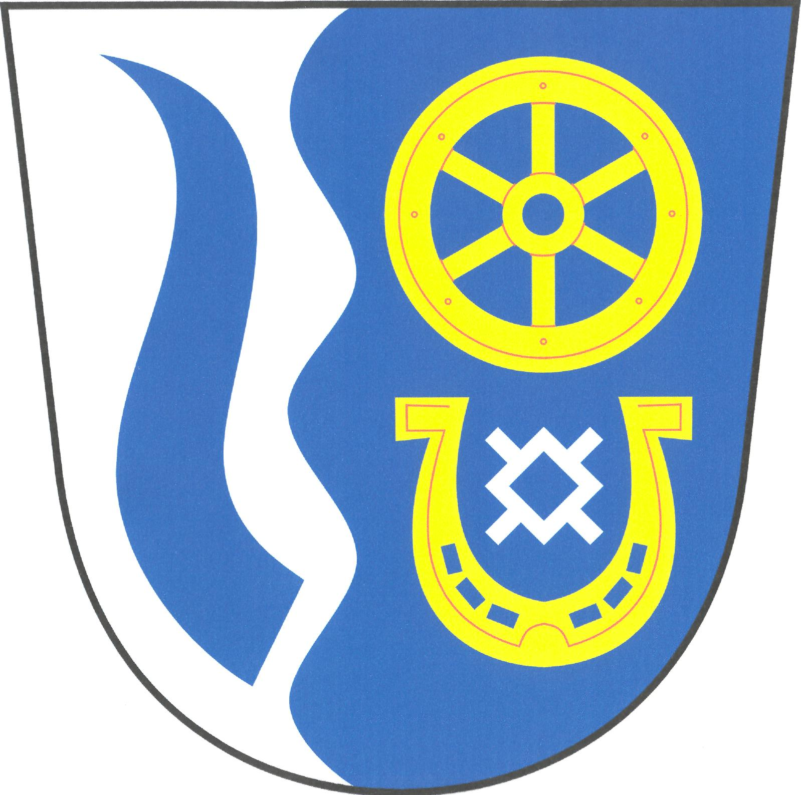 Znak obce Říčky v okrese Brno-venkov